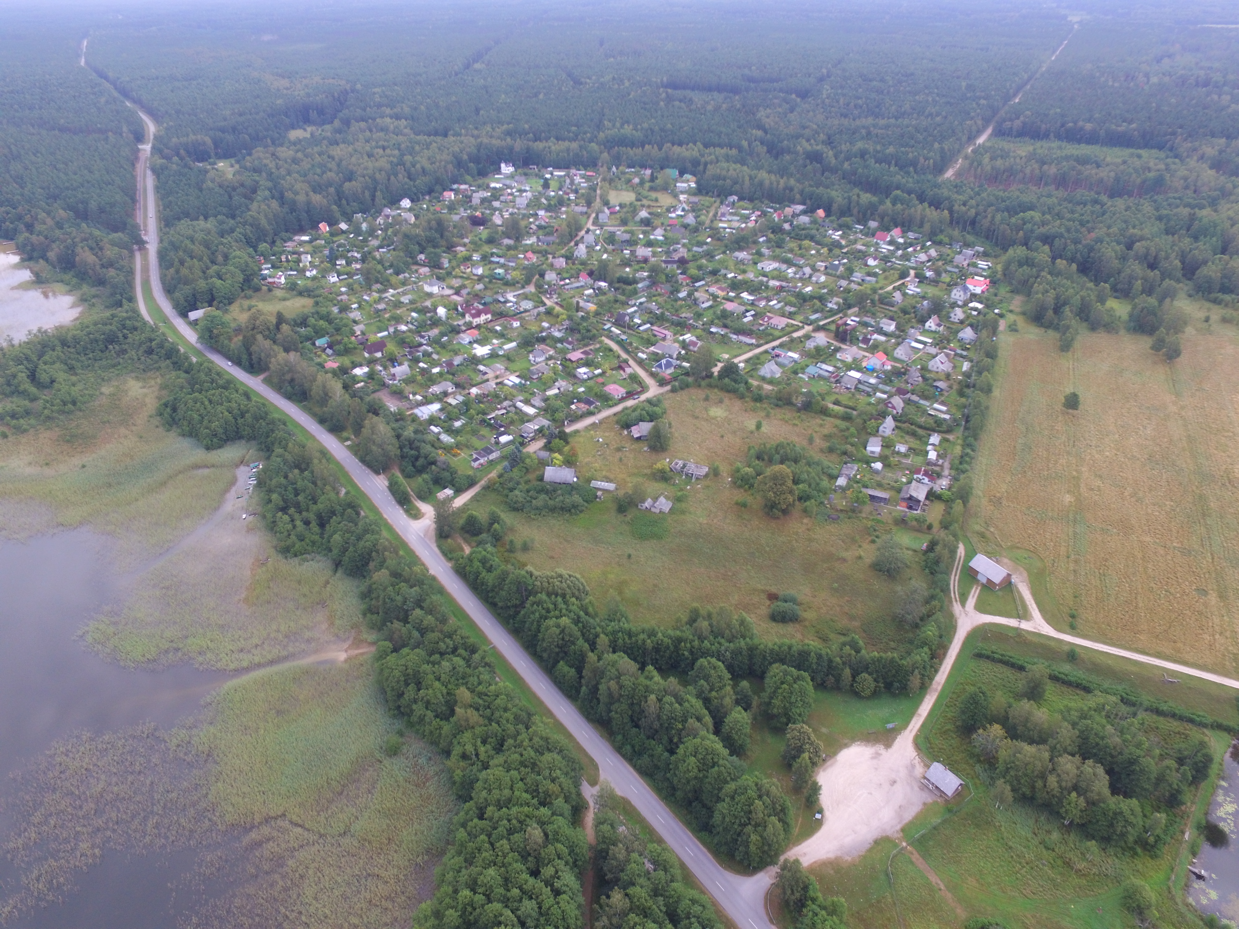 Būšnieki 12/08/2019